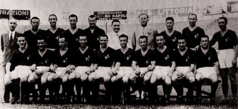 La rosa dell'AS Roma campione d'Italia nella stagione 1941-42. Da sinistra, in piedi: Biancone, Andreoli, Cappellini, Mornese, Masetti, Bazzini (presidente), Shaffer (allenatore), Acerbi, Brunella, Pantò; seduti: Nobile, Benedetti, De Grassi, Jacobini, Donati, Bonomi, Krieziu, Amadei, Coscia, Borsetti.